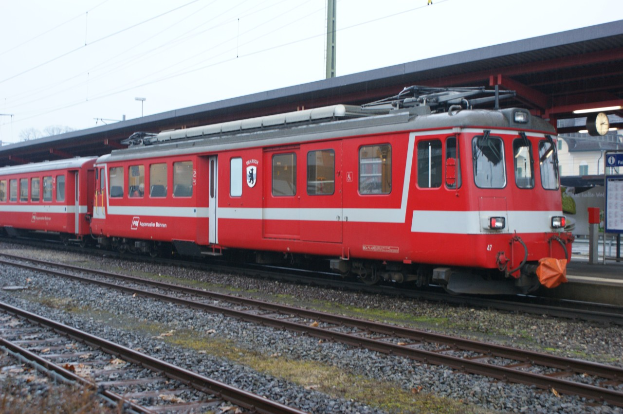 Triebwagen BDe 4/4 47 der Appenzeller Bahnen in Gossau SG